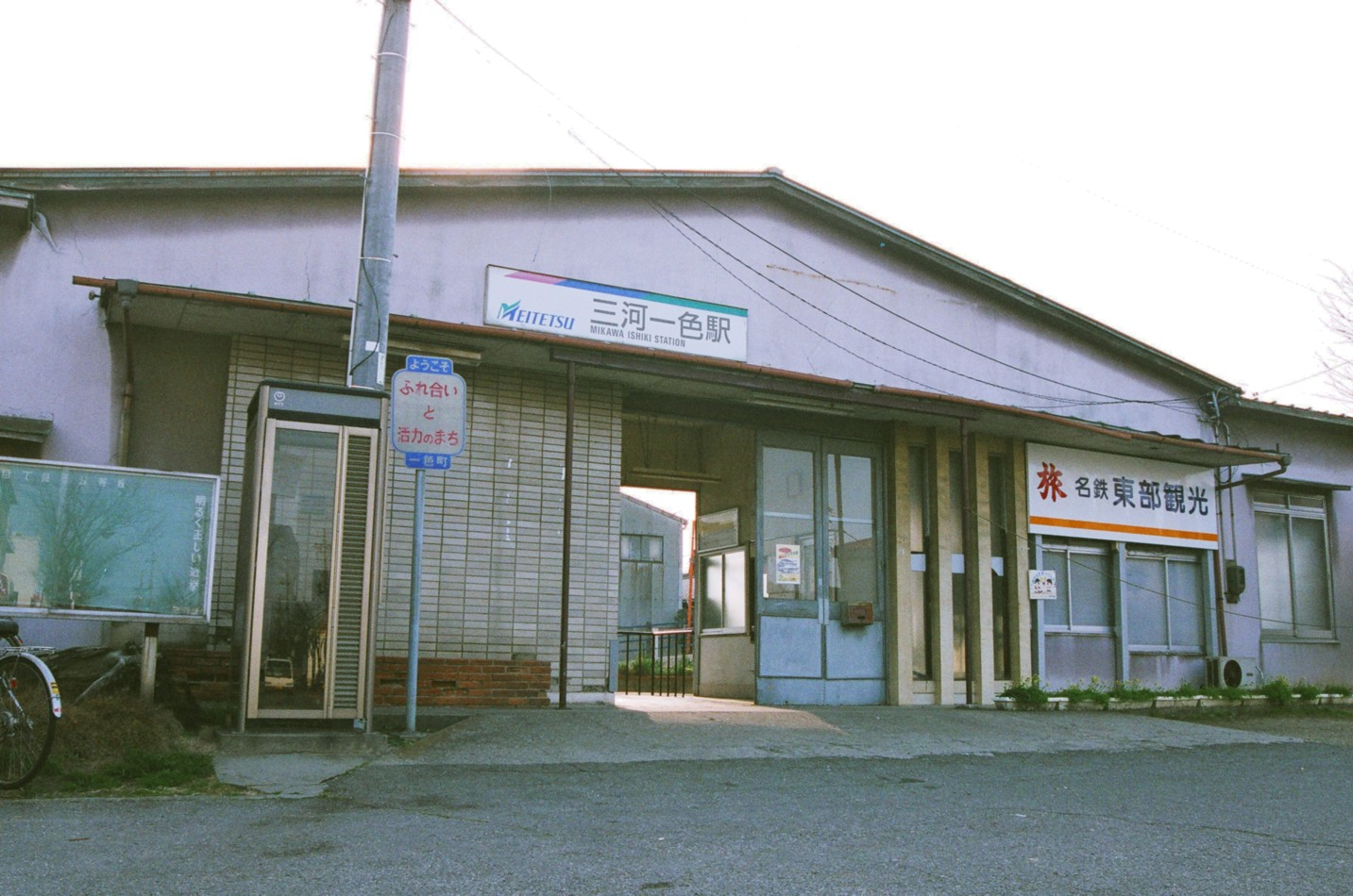 Nagoya-Railroad Mikawa-line Mikawaisshiki-Station(Isshiki town, Hazu gun, Aichi prefecture, Japan). 名鉄三河線三河一色駅の駅舎。 2004年3月31日に碧南－吉良吉田の駅間の営業廃止により廃駅となる。 駅の所在地は愛知県幡豆郡一色町。